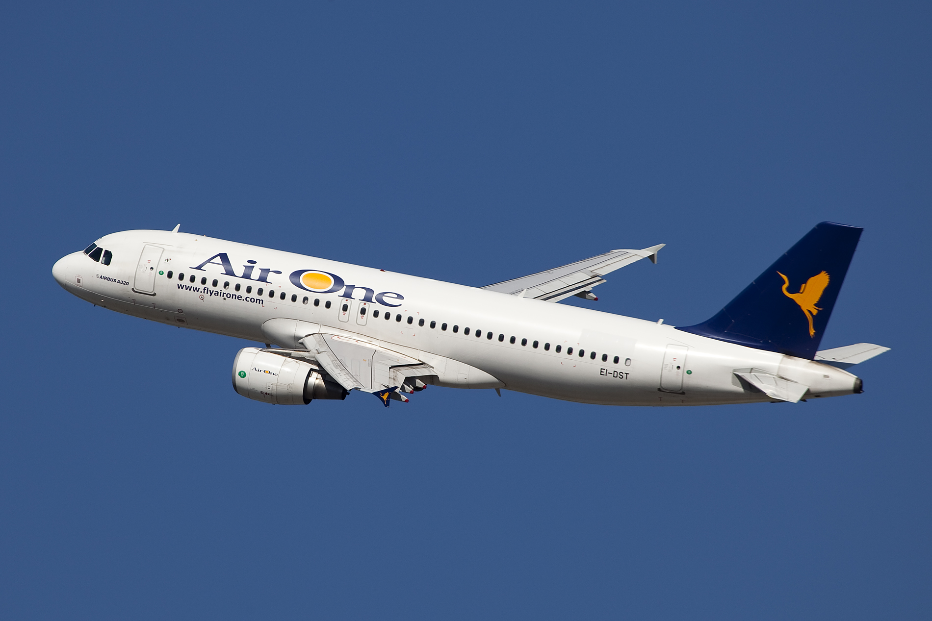 Milaan- Malpensa